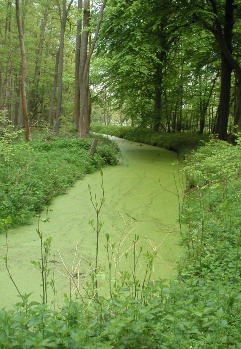 Gewässer mit Entengrütze auf dem Darß